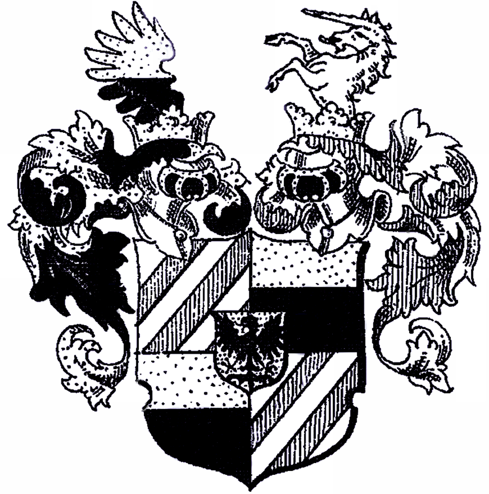 Wappen der Ritter Regner von Bleysleben, bestätigt 1610